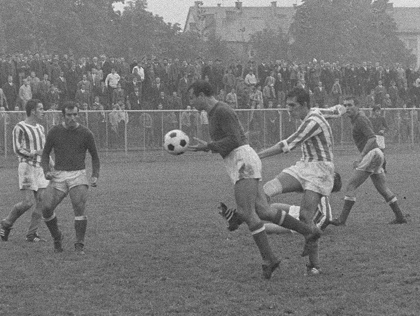 Nogomet Železničar - Šibenik v drugi zvezni ligi SFRJ.